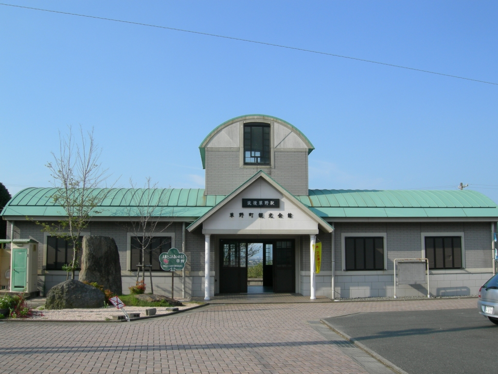 久大本線・筑後草野駅（2006年9月自身撮影）